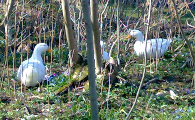 Pekinand Pekin Duck Norway